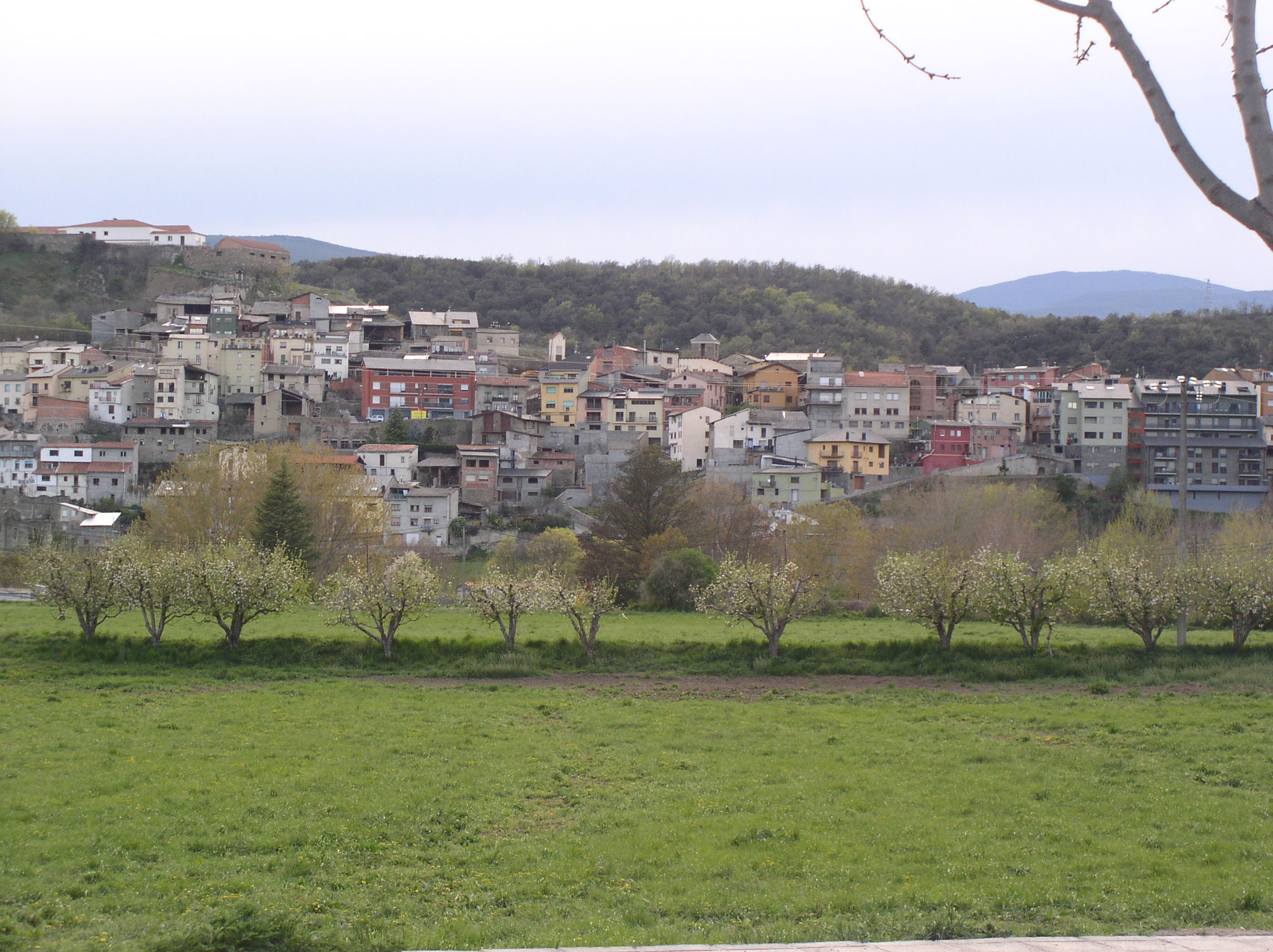 Fotografia de Castellciutat des de l'Horta del Valira (la Seu d'Urgell, Alt Urgell, Catalunya, Espanya).)